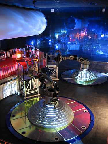 Vue intérieure du Pavillon des Robots du Futuroscope, abritant l'attraction Danse avec les Robots. Peter Hacker 2006-03-29 serial no. 891-9177 Photographie personnelle de PeterHacker.